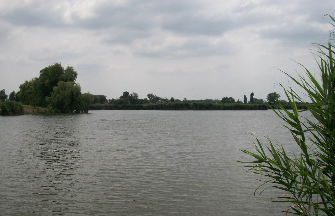 Водоём в станице Дондуковская